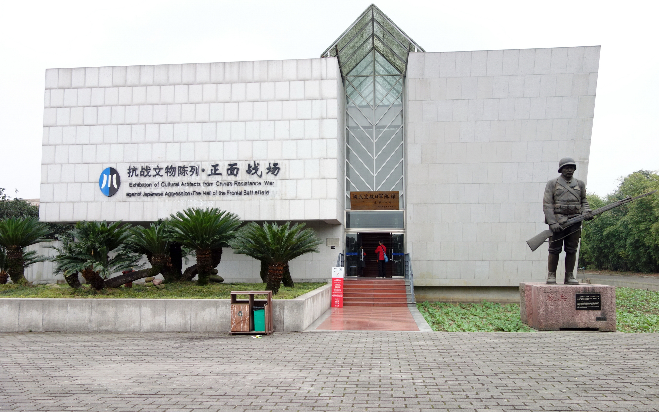 建川博物馆聚落抗日战争正面战场馆，纪念国民党政府军队抗战历史。